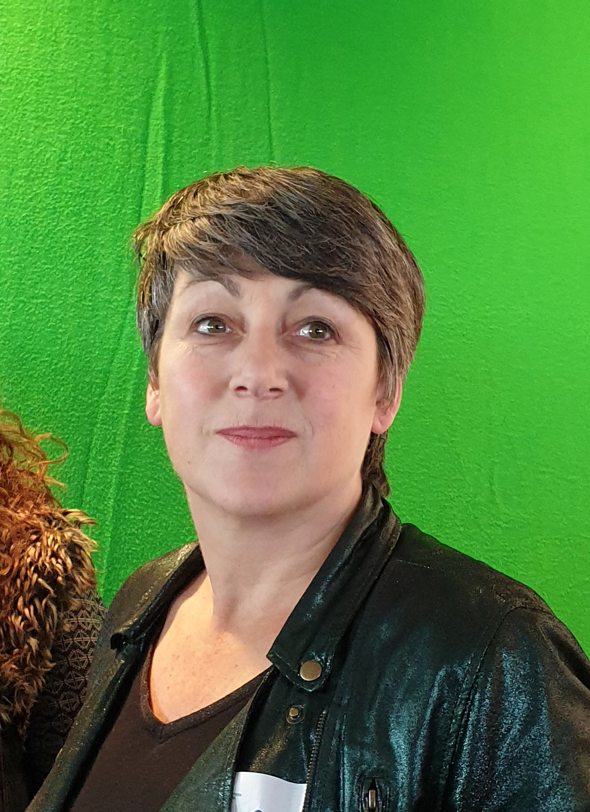 Dans le cadre de la nomination de 100 femmes organisé par les universités de Suisse Romande et de Bourgogne Franche Comté, remise des prix aux lauréates le 8 novembre 2019 à Genève - 100femmes.ch